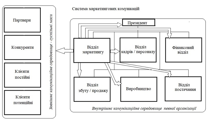 Ознака когнітивних планів